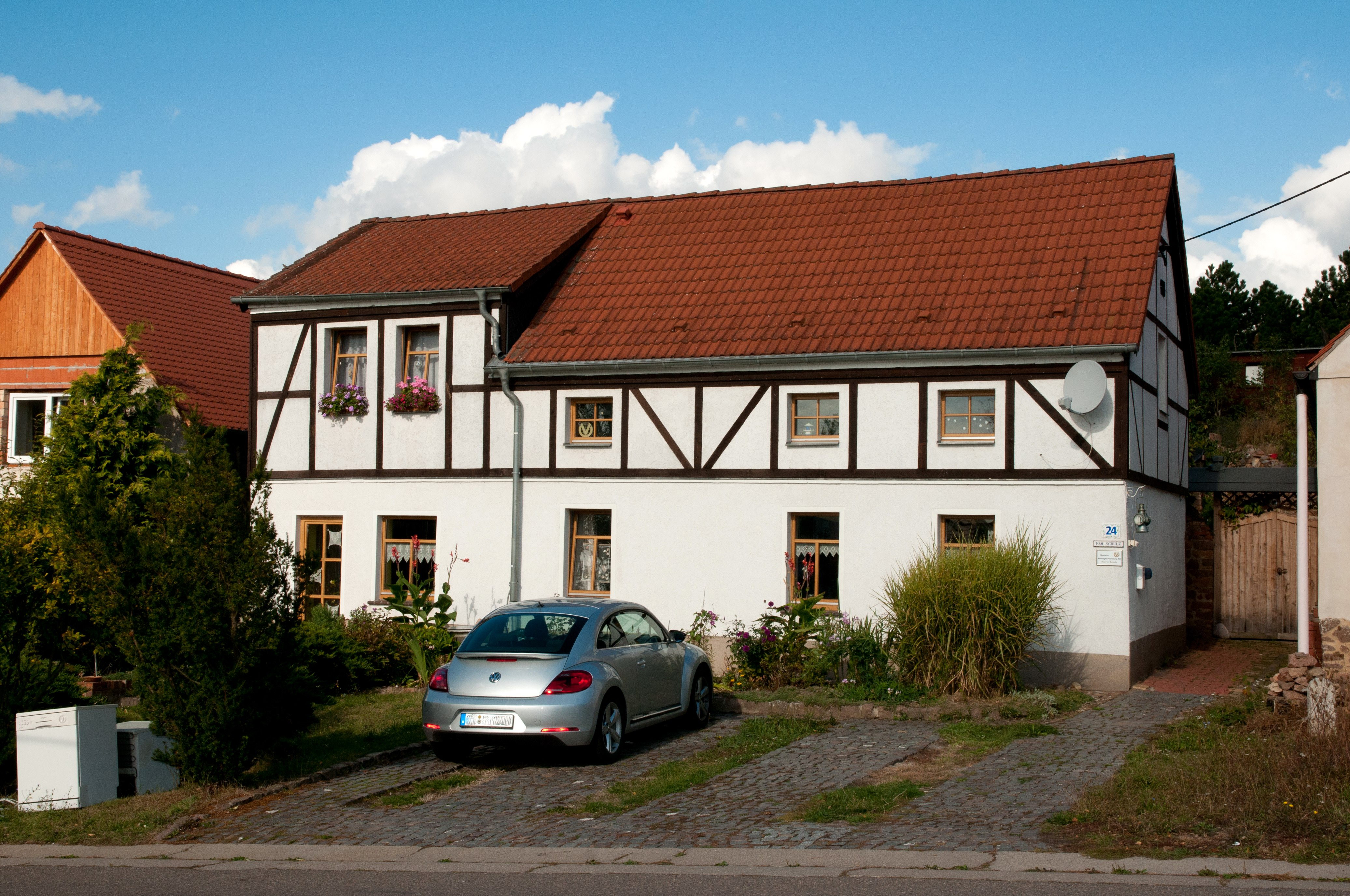 Friedrichschwerz Dorfstrasse 24 (Sachsen Anhalt, Deutschland)